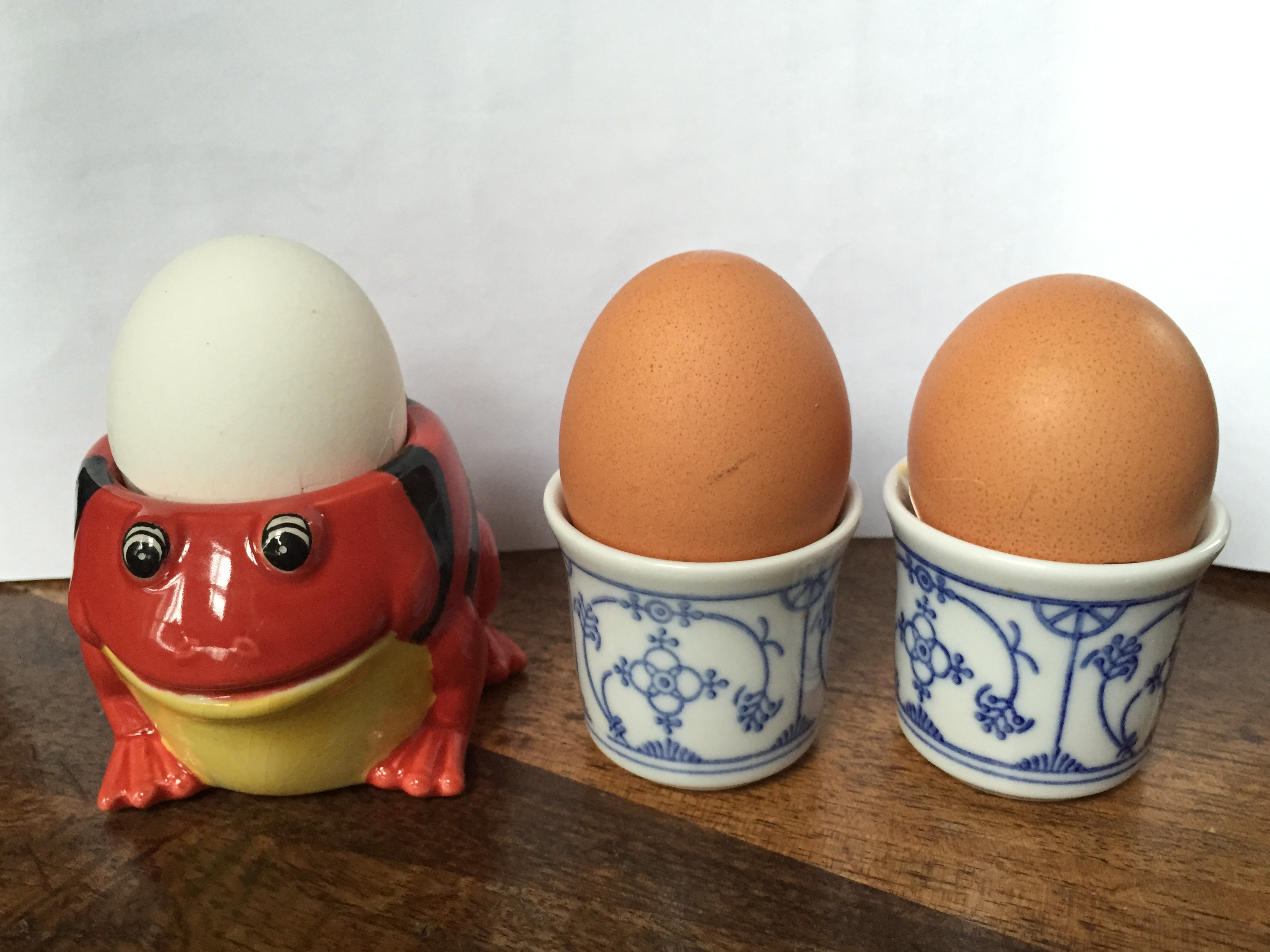 Ein (doppelter) Ausreisser: Eier und Becher